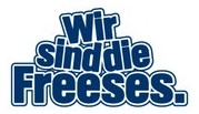 Logo der Radio-Comedy "Wir sind die Freeses." Ab 08. September 2014 im Norddeutschen Rundfunk (NDR2). Die Genehmigung zur Nutzung in Wikimedia Commons und Wikipedia wurde durch die Redaktion des NDR2 am 6. September 2014 erteilt.